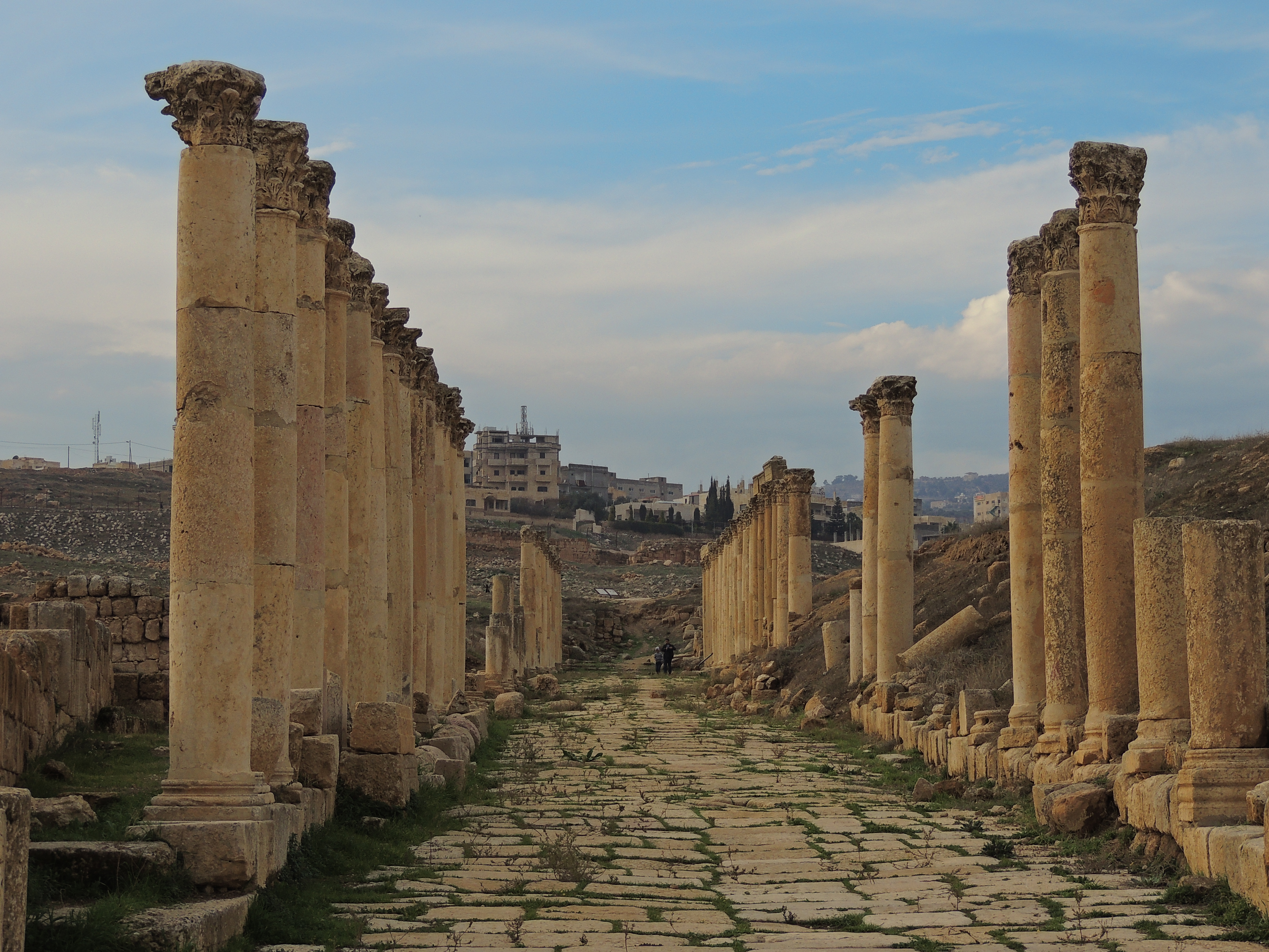 صورة لشارع الأعمدة الأثري الموجود في منطقة جرش الأثرية التي تقع في شمال المملكة الأردنية الهاشمية ، حيث يظهر في الصورة الترتيب المتناسق للأعمدة على الجهة اليمنى وما يوازيها من نفس الترتيب على الجهة اليسرى، وتفاصيل الأرض الصخرية المتصدعة وكيفية خروج النبات من بين صخورها. أما من ناحية أخرى، تظهر الصورة جبال منطقة جرش التي يعتليها الأحياء السكنية القريبة من منطقة جرش الأثرية.